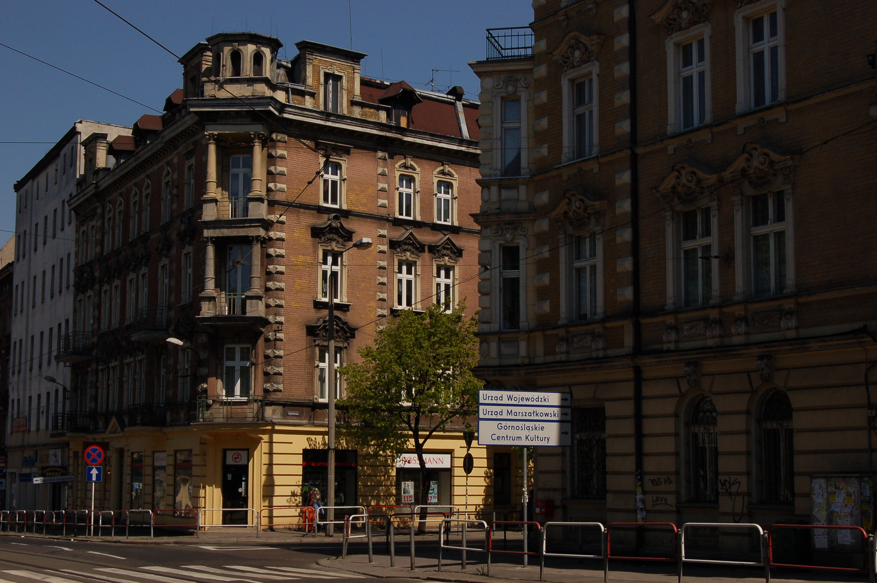 Katowice Plac Miarki X Jagiellońska